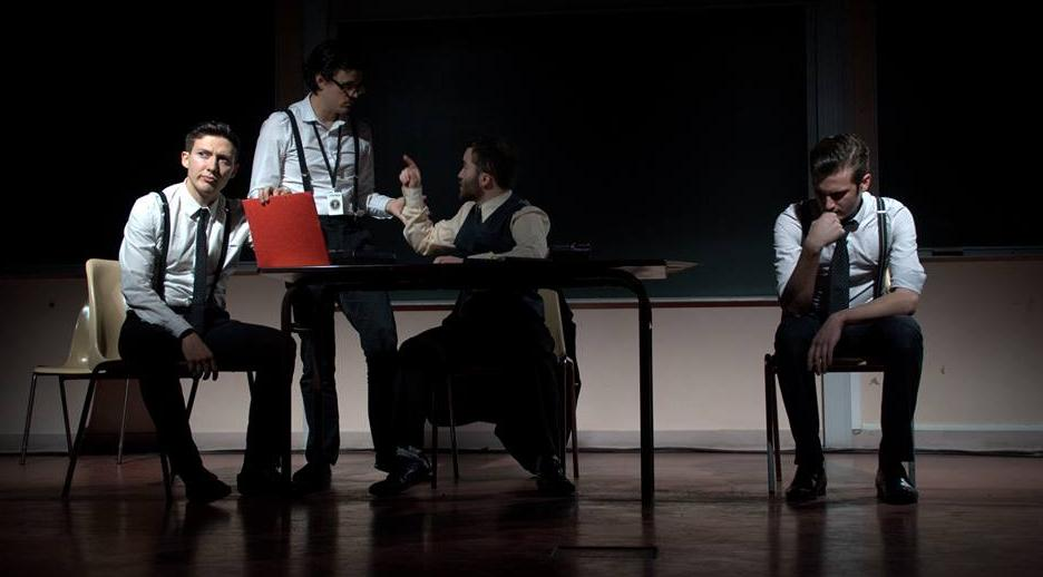 Pièce de théâtre Where is Boston, écrite et mise en scène par Alban Valembois. Représentation à l'amphithéâtre Lajugie de l'université de Bordeaux le 25 mars 2014.